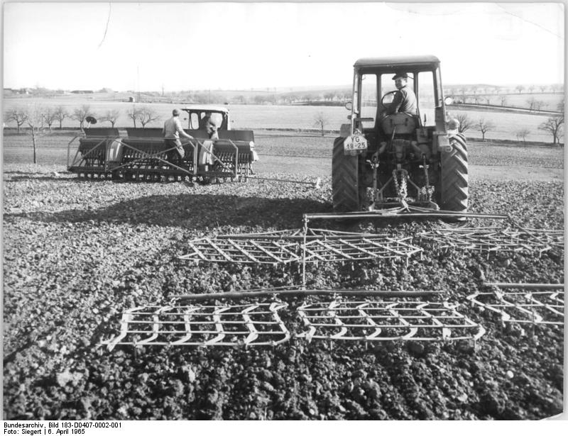 LPG Diera, Vorbereitung der Aussaat Zentralbild Siegert At.6.4.1965 Bereits am 3.4.1965 haben die Genossenschaftsbauern der LPG "Aufbau" in Diera, Kreis Meissen die Sommergetreideaussaat beendet.Insgesamt hatten die Genossenschaftsbauern 60 ha Getreide zu bestellen.Unser Bild zeigt im Vordergrund den Traktoristen Albrecht Gasch mit dem ungarischen Schlepper D4K mit schweren und leichten Eggen, links hinten drillen die Genossenschaftsbauern Fritz Loff und Franz Bogsch.